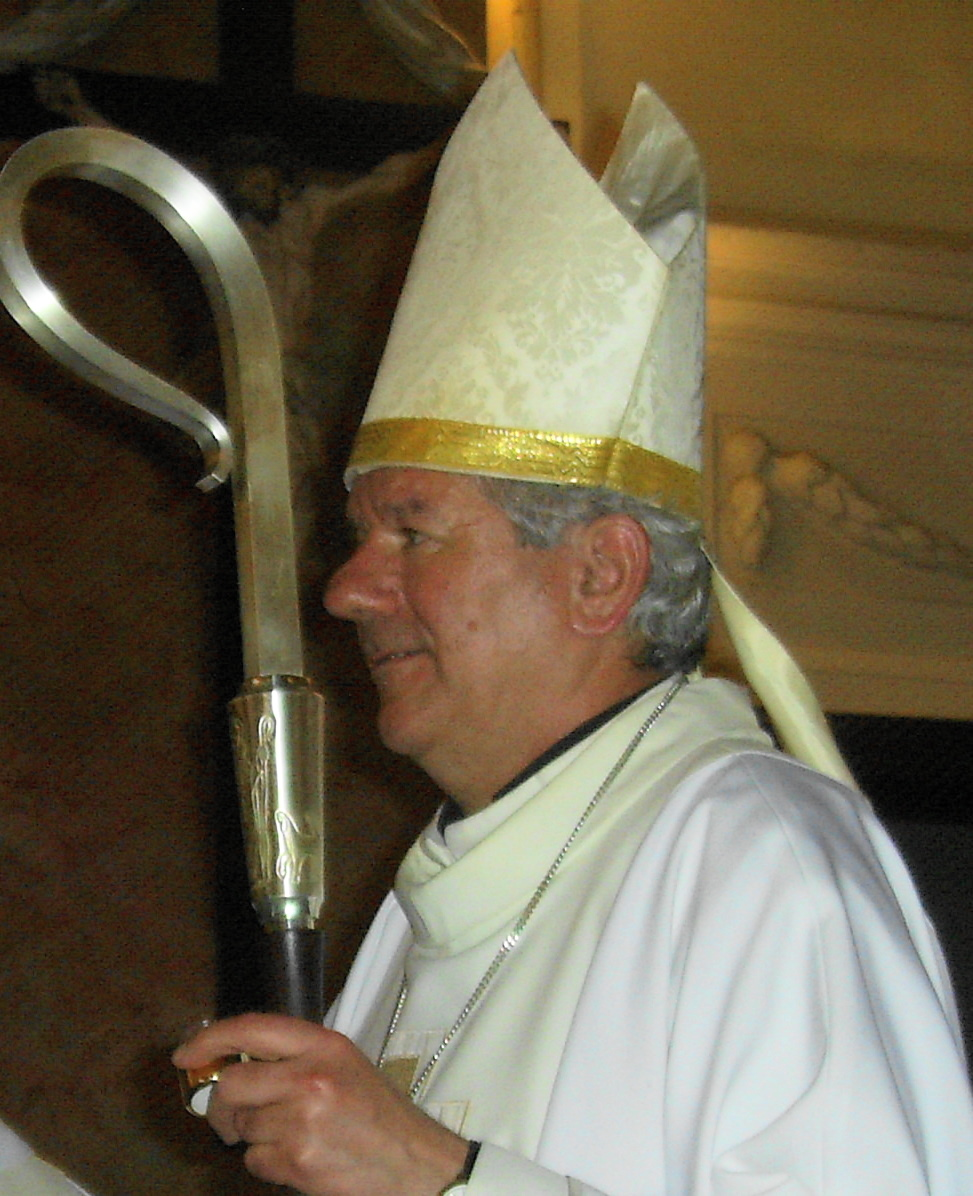 Kiss-Rigó László szeged-csanádi megyés püspök a gyulai Nádi Boldogasszony Plébánián tartott bérmáláskor.